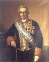 Spanischer Ministerpräsident Lorenzo Arrazola y Garcia (Gemälde)